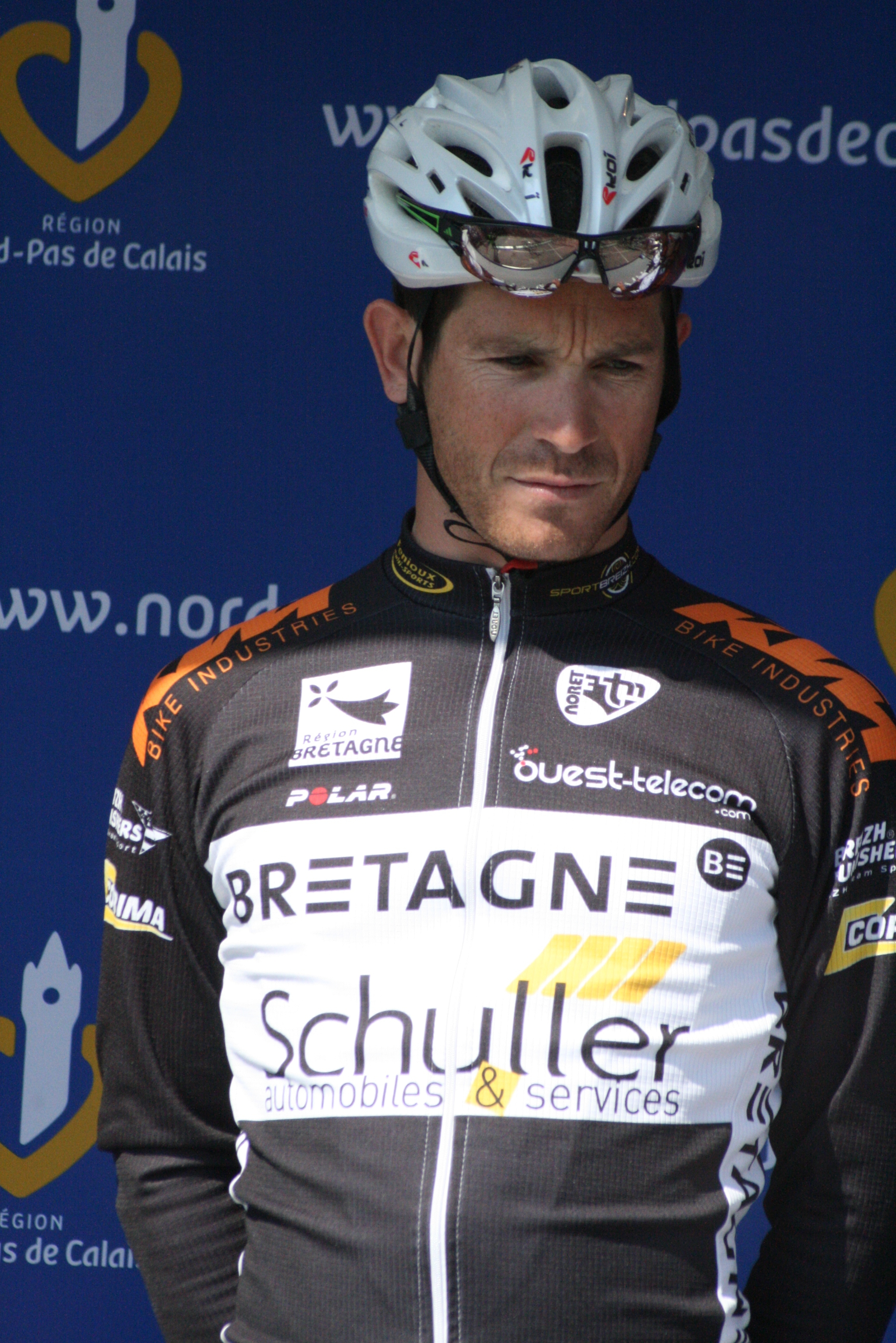 Présentation des coureurs au départ de la première étape Jean-Luc Delpech